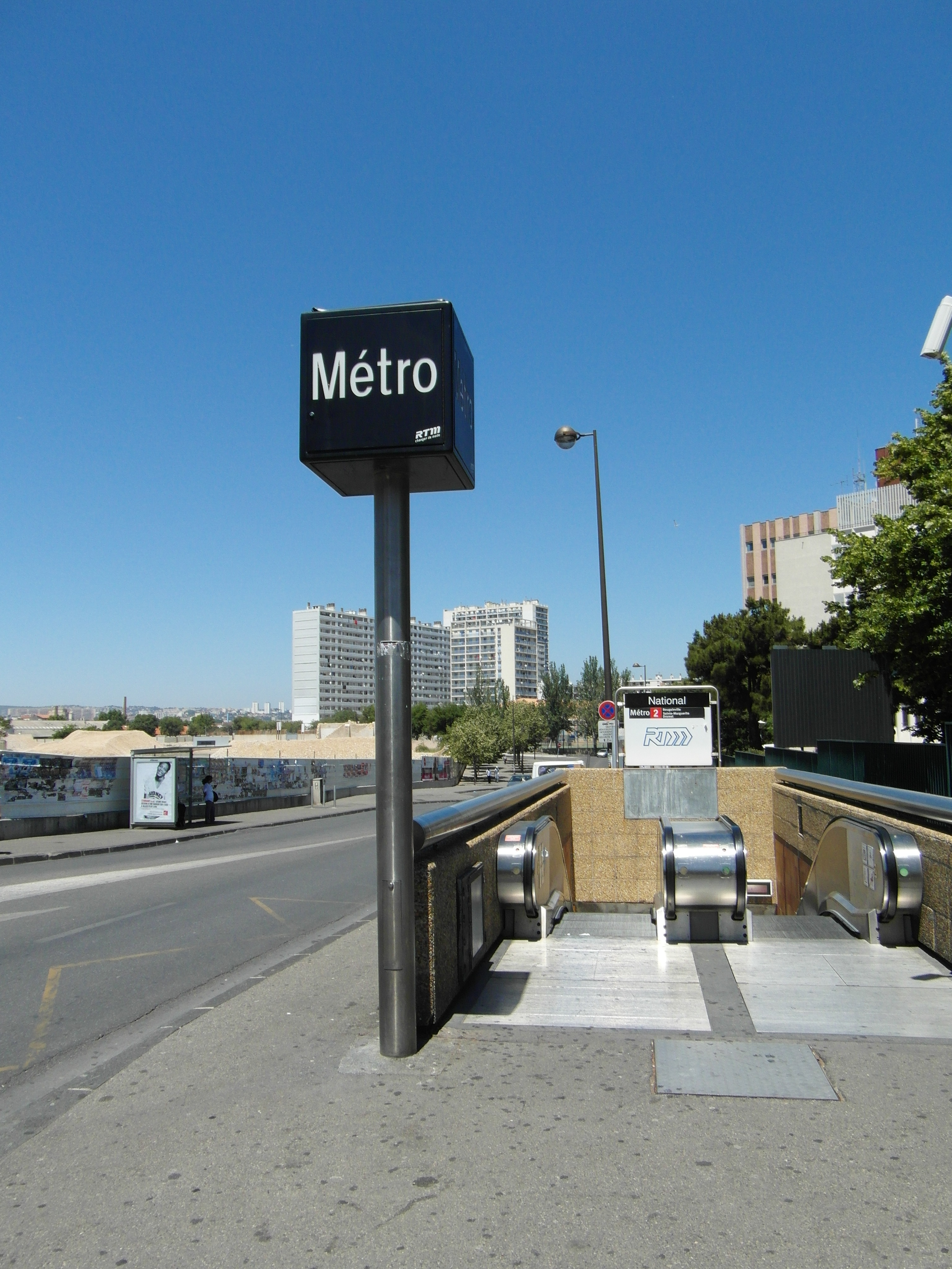 Marseille - Métro - National